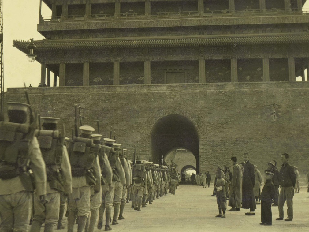 正陽門に入る北洋軍歩兵